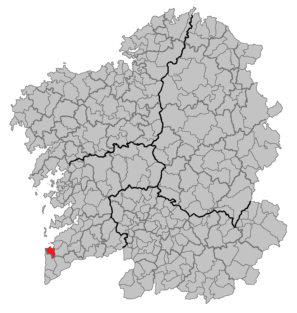 Mapa coa localización do concello de Baiona.